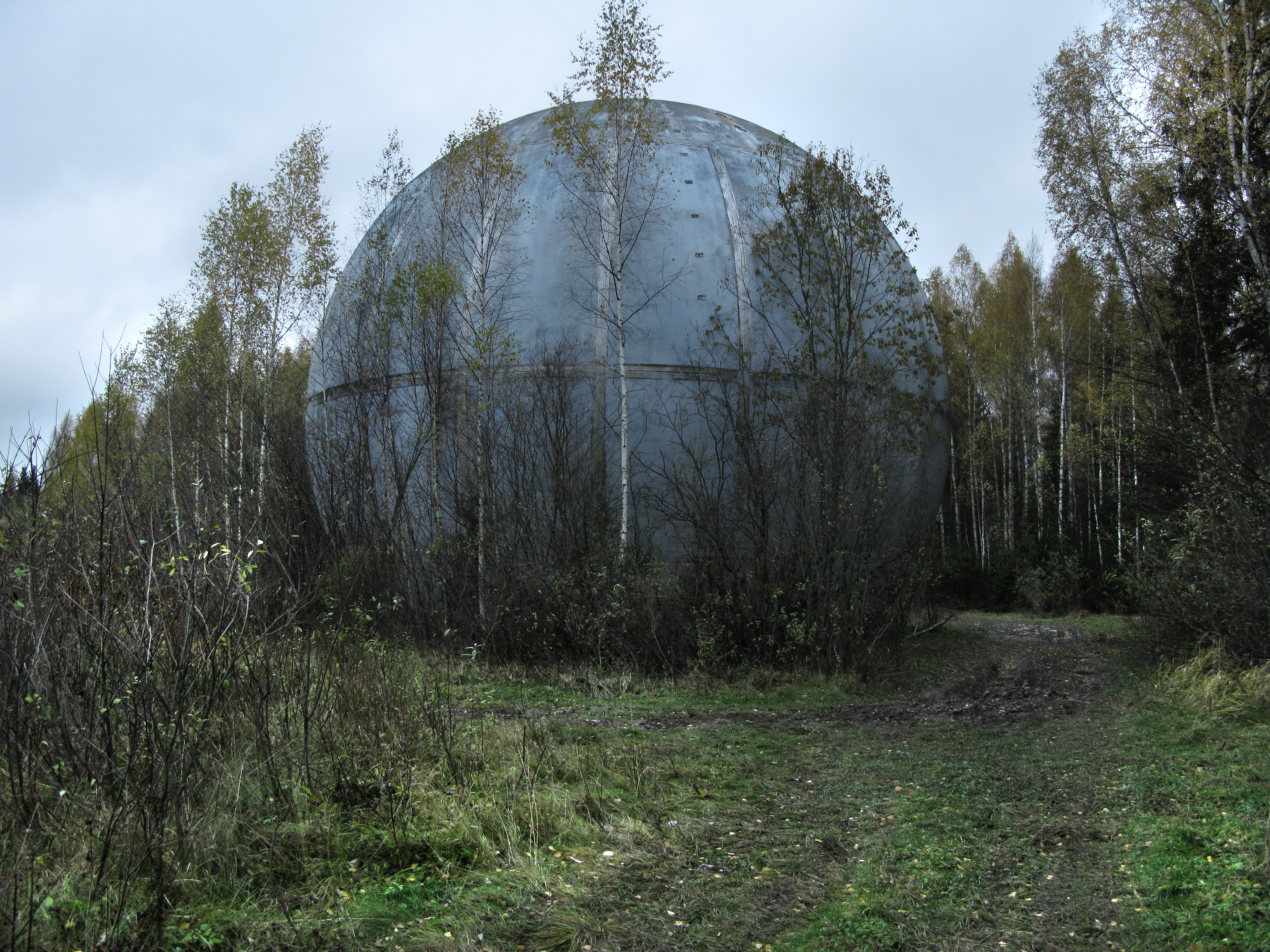 Общий вид Шара.